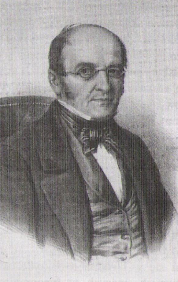 Portret Józefa Korzeniowskiego